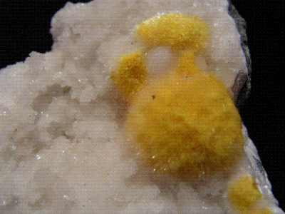 Okenit,_kamieniołom_Malad,_2Maharashtra,_Indie; autor zdjęcia Paleonet; 10.12.2006r.